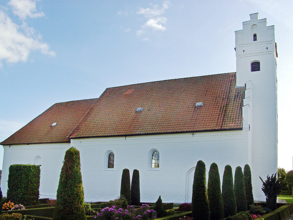 fra nord